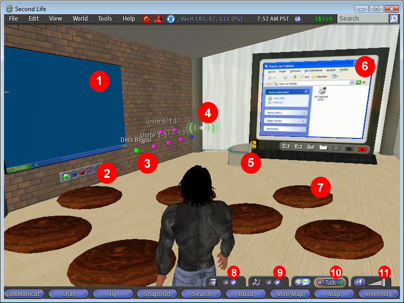 Sanal dünyaların uzaktan eğitim danışmanlık hizmetlerinde kullanımı: Second Life örneği, Yüksek Lisans Tezinden ekran görüntüsü